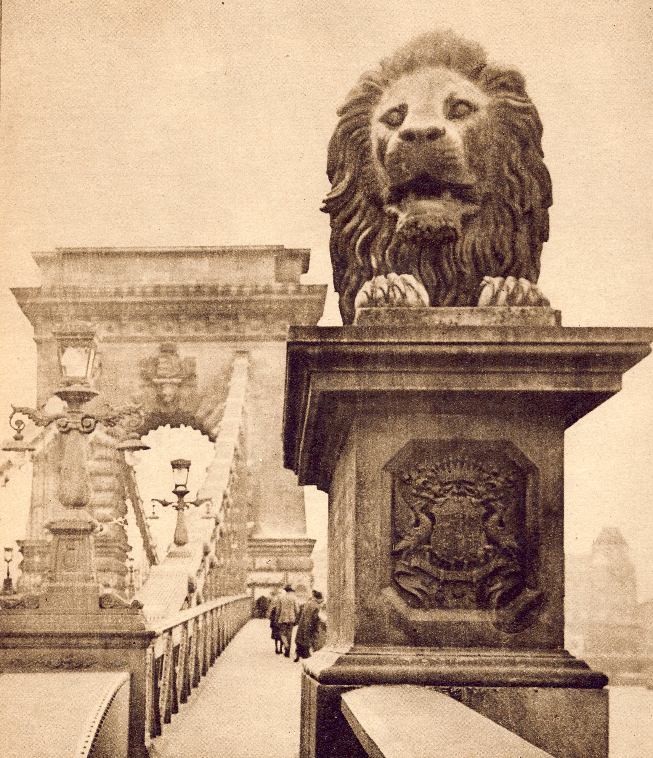 Budapest, Lánchíd. 1928 tavaszán.